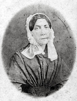 Maria Martin Bachman (1796-1863)